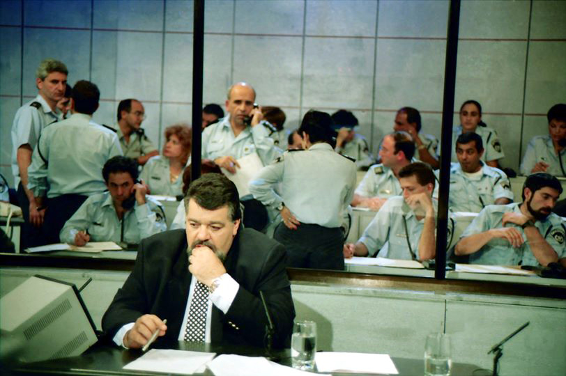 רפי גינת עם צוות חוקרי המשטרה בתכניתו "בשידור חוקר"